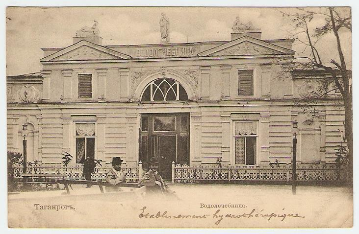 Таганрогская водолечебница